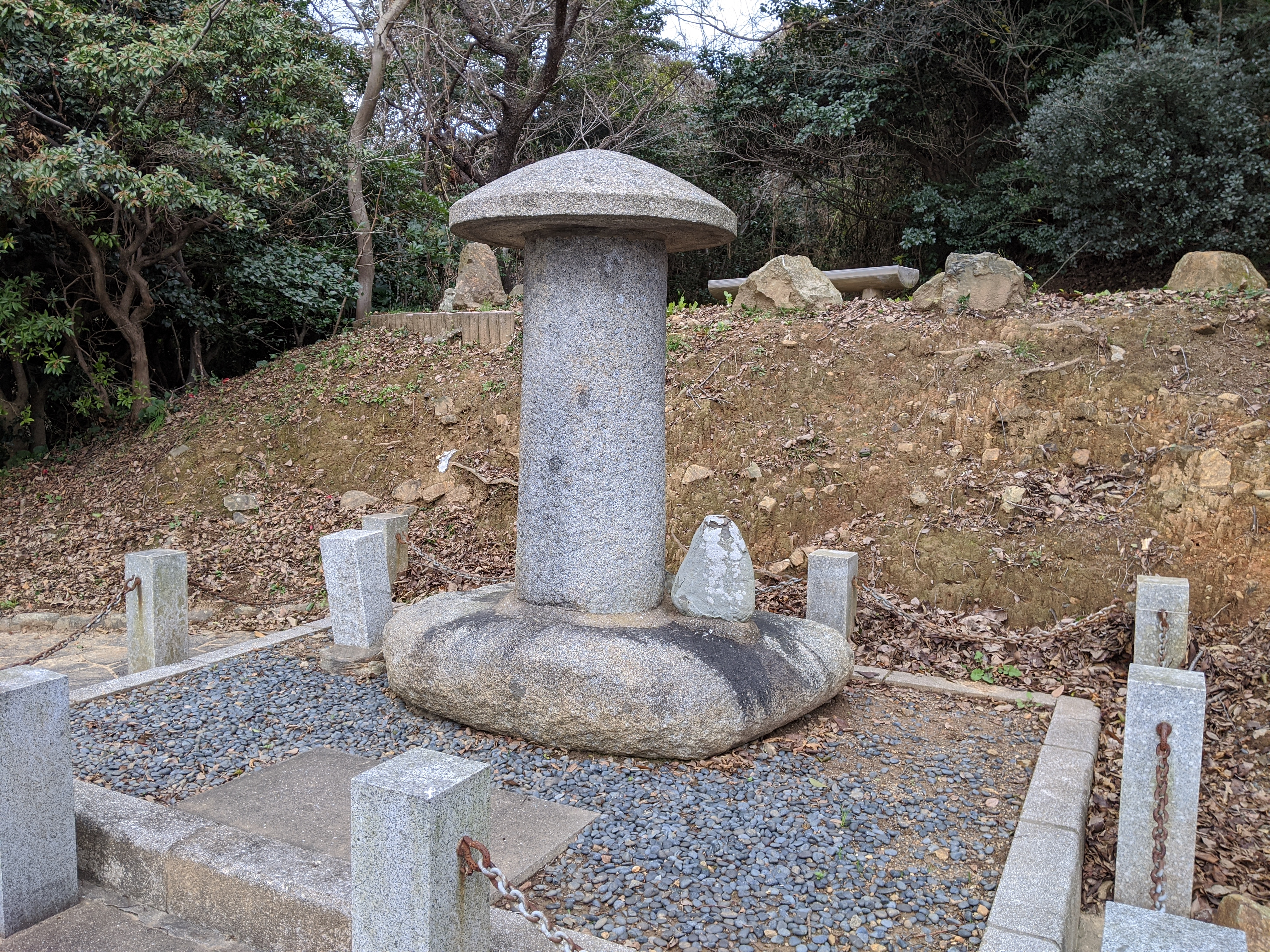 文禄元年（1592年）7月、名護屋城から大坂城に向かう豊臣秀吉の御座船が関門海峡の難所「篠瀬」で座礁したことから、責任を負って切腹した船奉行明石与次兵衛を慰霊する塔（北九州市門司区・めかり公園内）。